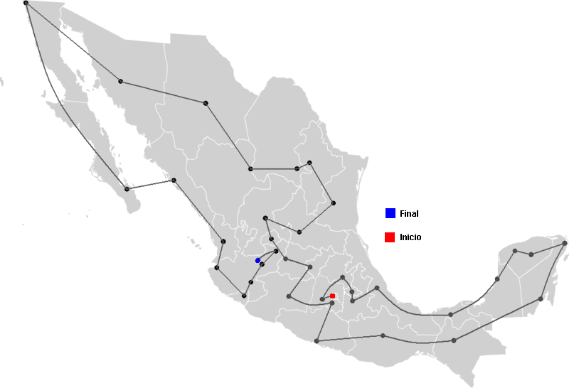 Ciudades que recorrio la antorcha panamericana en México 2011